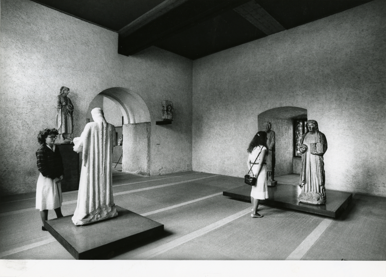 Servizio fotografico : Venezia, 1982 / Paolo Monti. - Stampe: 2 : Positivo b/n, gelatina bromuro d'argento/ carta, 24x30. - ((Al verso delle stampe manoscritti i numeri dei negativi corrispondenti (formato 35 mm) con indicazione del fotogramma: 3869. - Sul coperchio della scatola iscrizione didascalica manoscritta a pennarello nero: "Verona". - Fonte: Agenda di Paolo Monti: Nikon Leika 3001-/ Monti 1978 (1978-1982), presso Archivio Paolo Monti